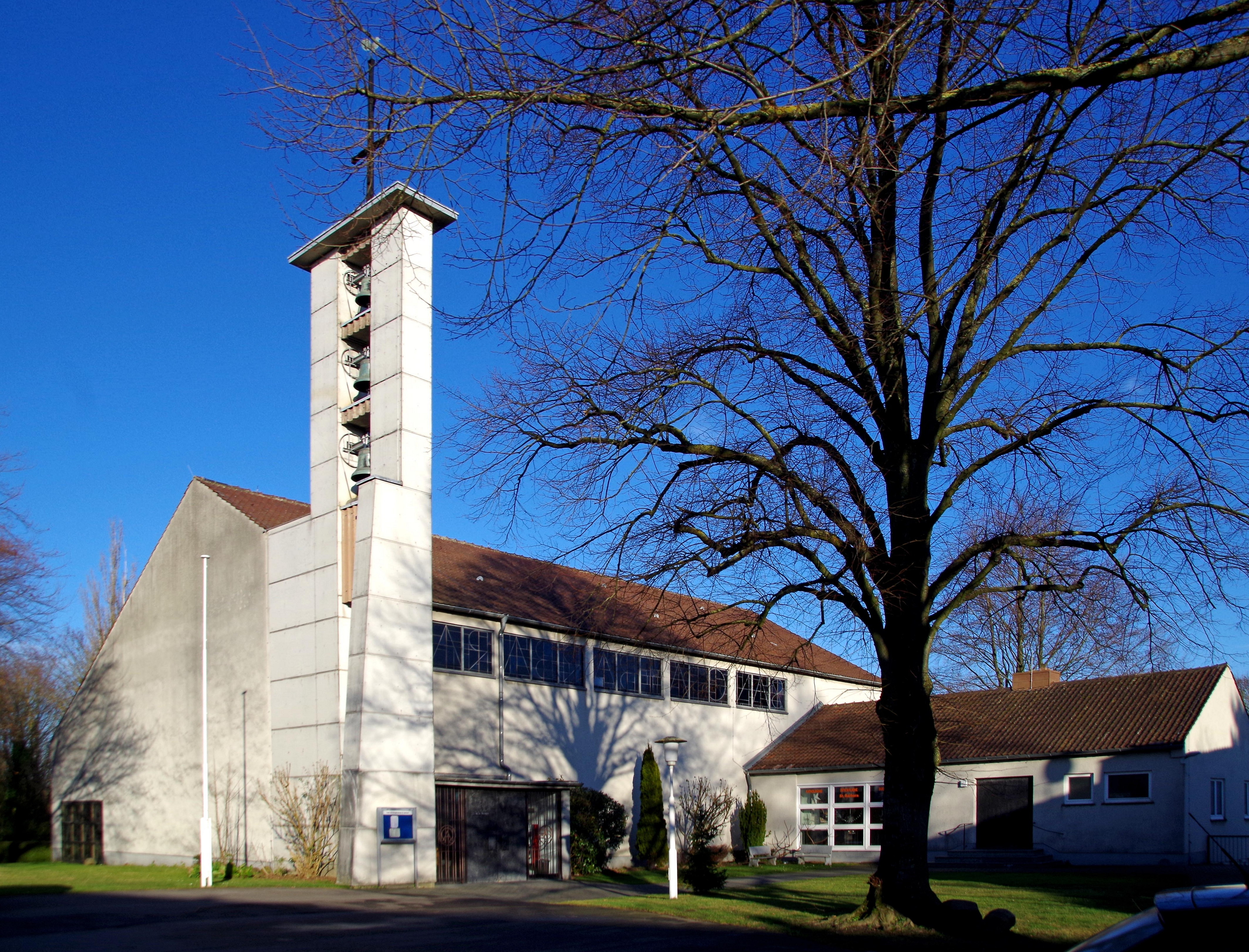 St. Barbara (Ofden), Westseite